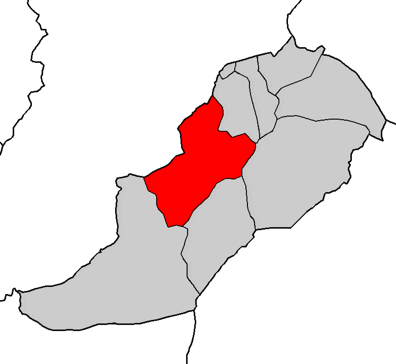 Situación da parroquia de Lagoa no concello de Alfoz